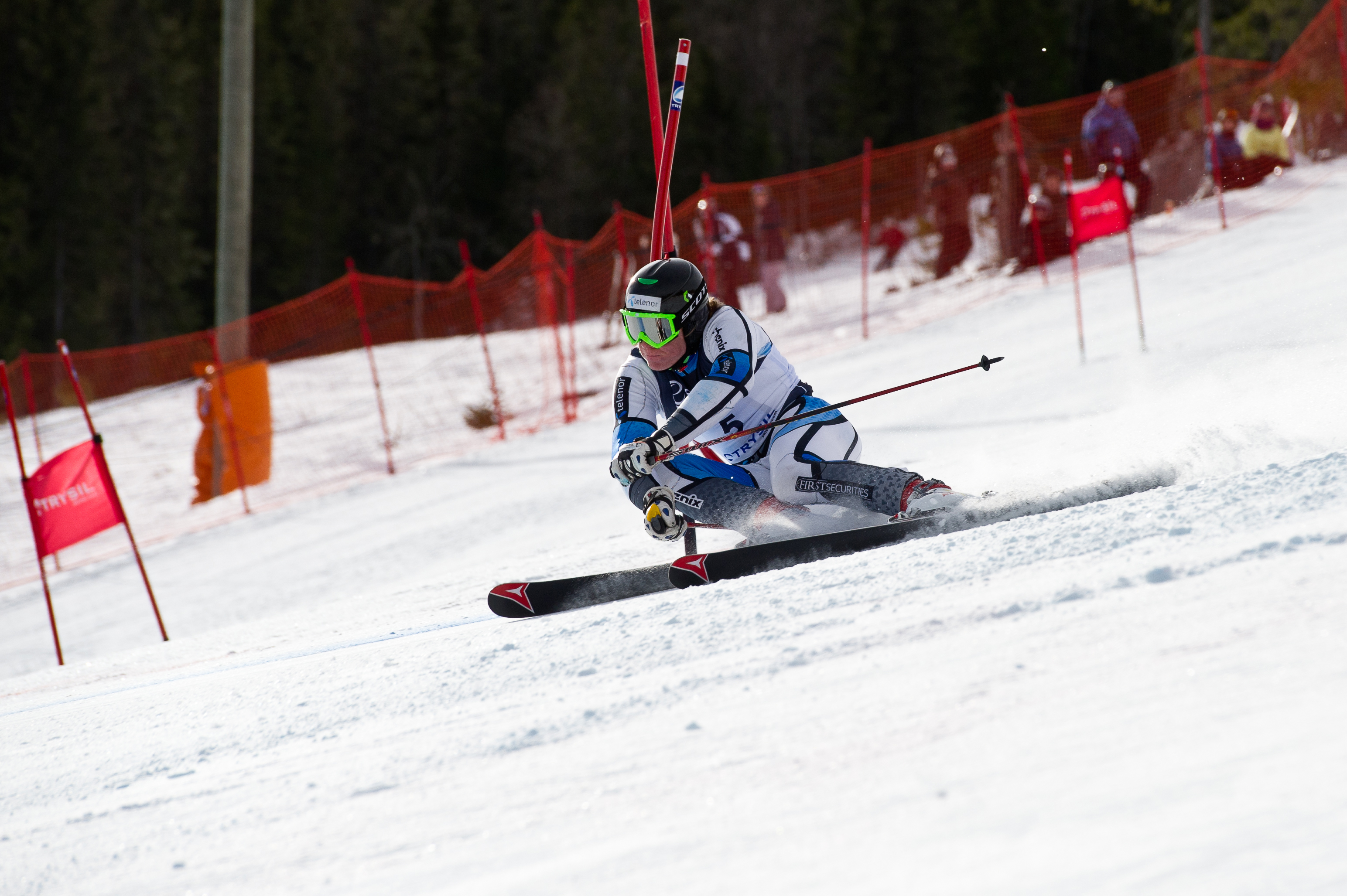 Nr. 12 - Aleksander Aamodt Kilde - NM i storslalåm i Trysil 26. mars 2011. Foto: Ola Matsson